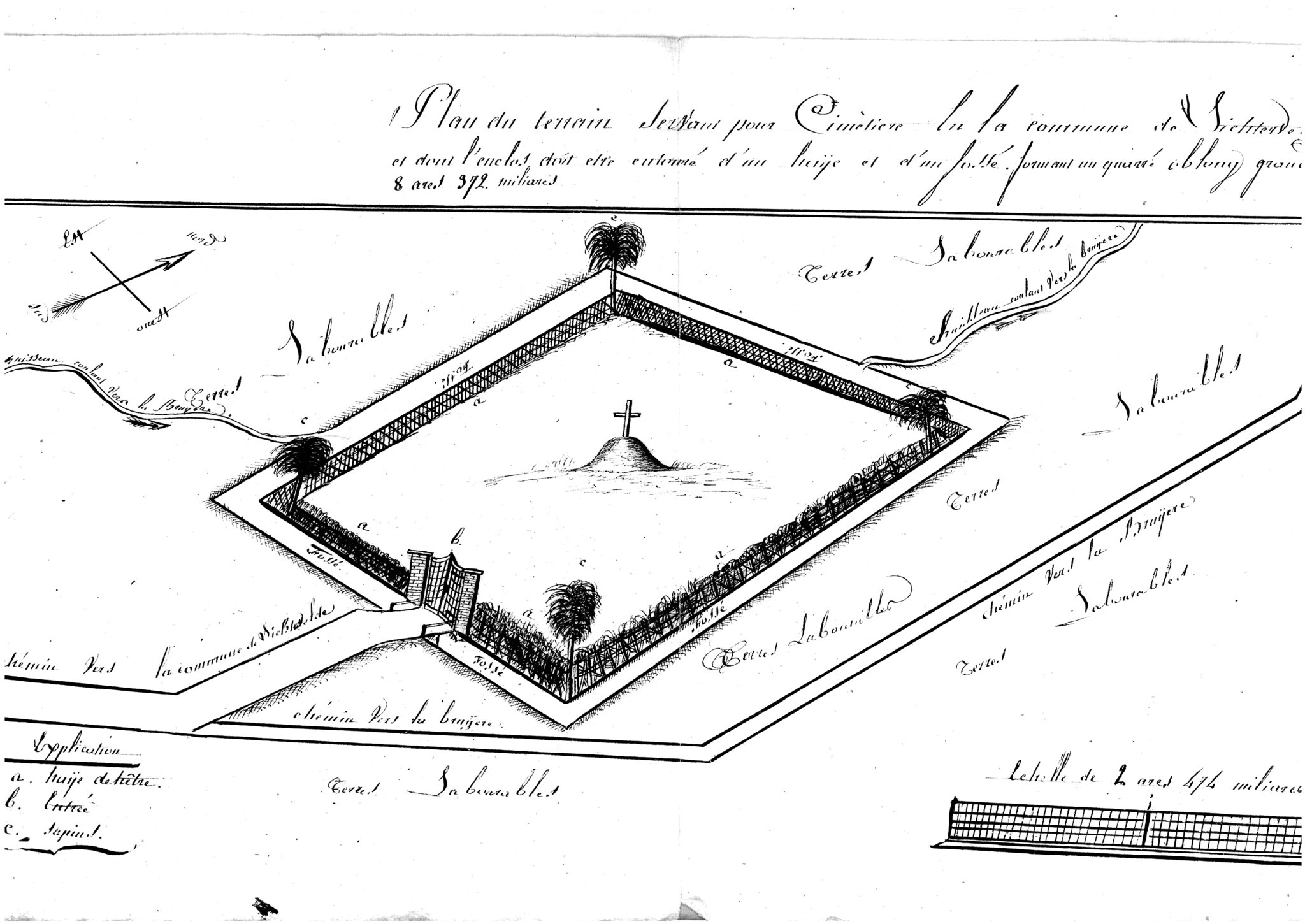 Plan Franse Periode